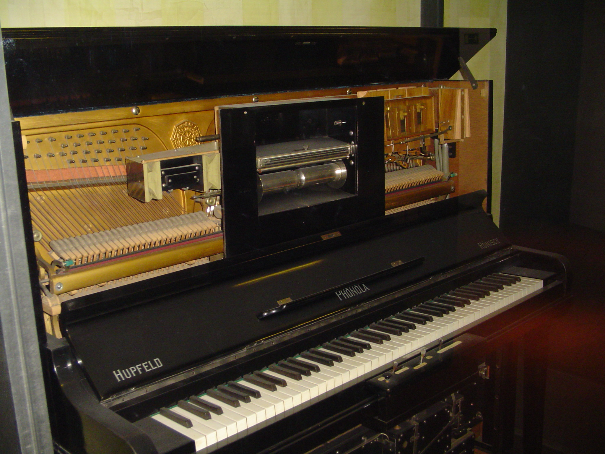 Rönisch Phonola Piano/ Pneumatisches Klavier/Ludwig Hupfeld AG/Leipzig 1915